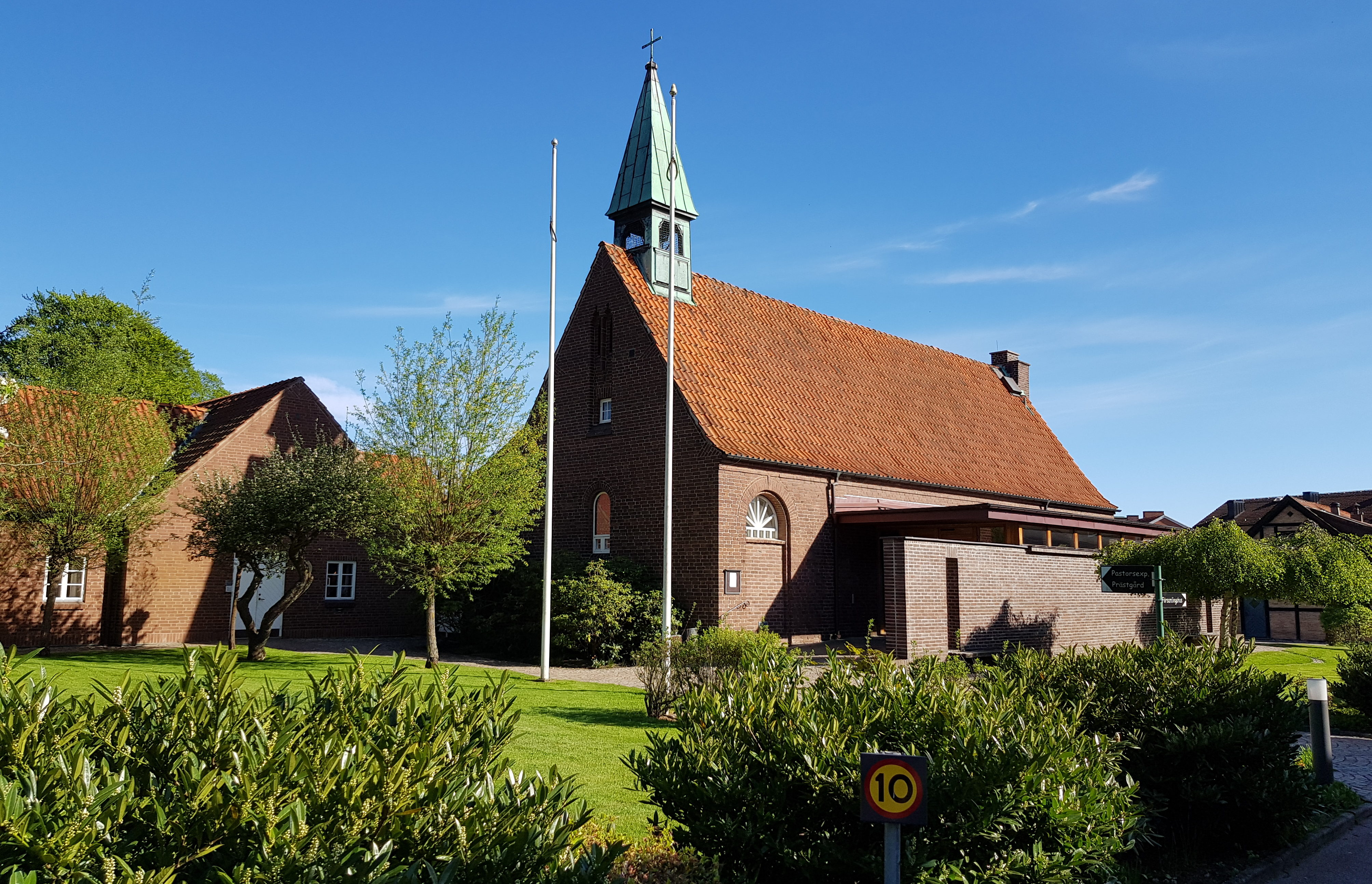 Sankt Clemens katolska kyrka i Helsingborg.